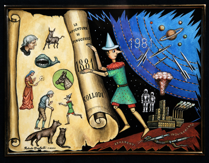 Allegoria di Pinocchio, di R. Dughetti.